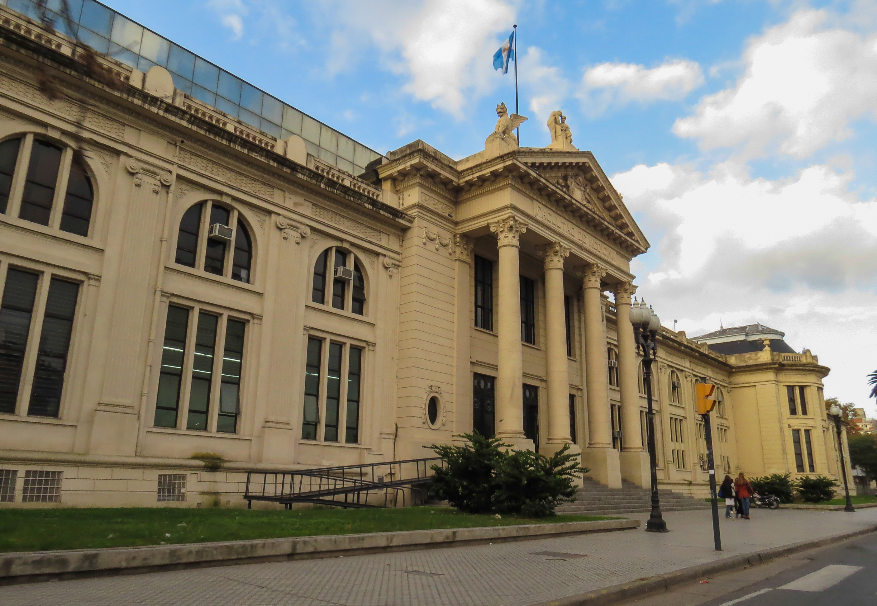 Facultad de Ciencias Mèdicas de Rosario